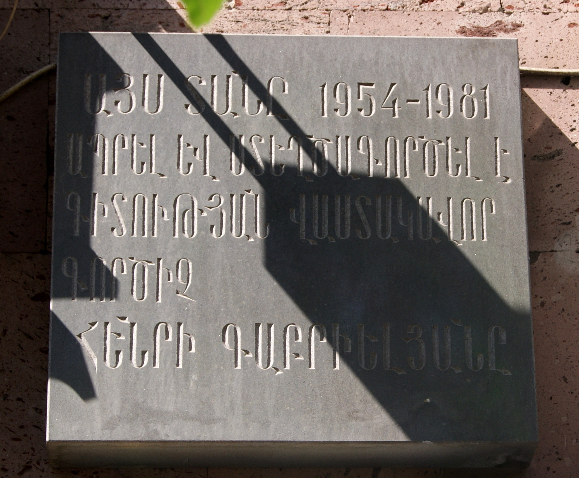 Henri Gabrielyan's plaque, Abovyan street 6/18